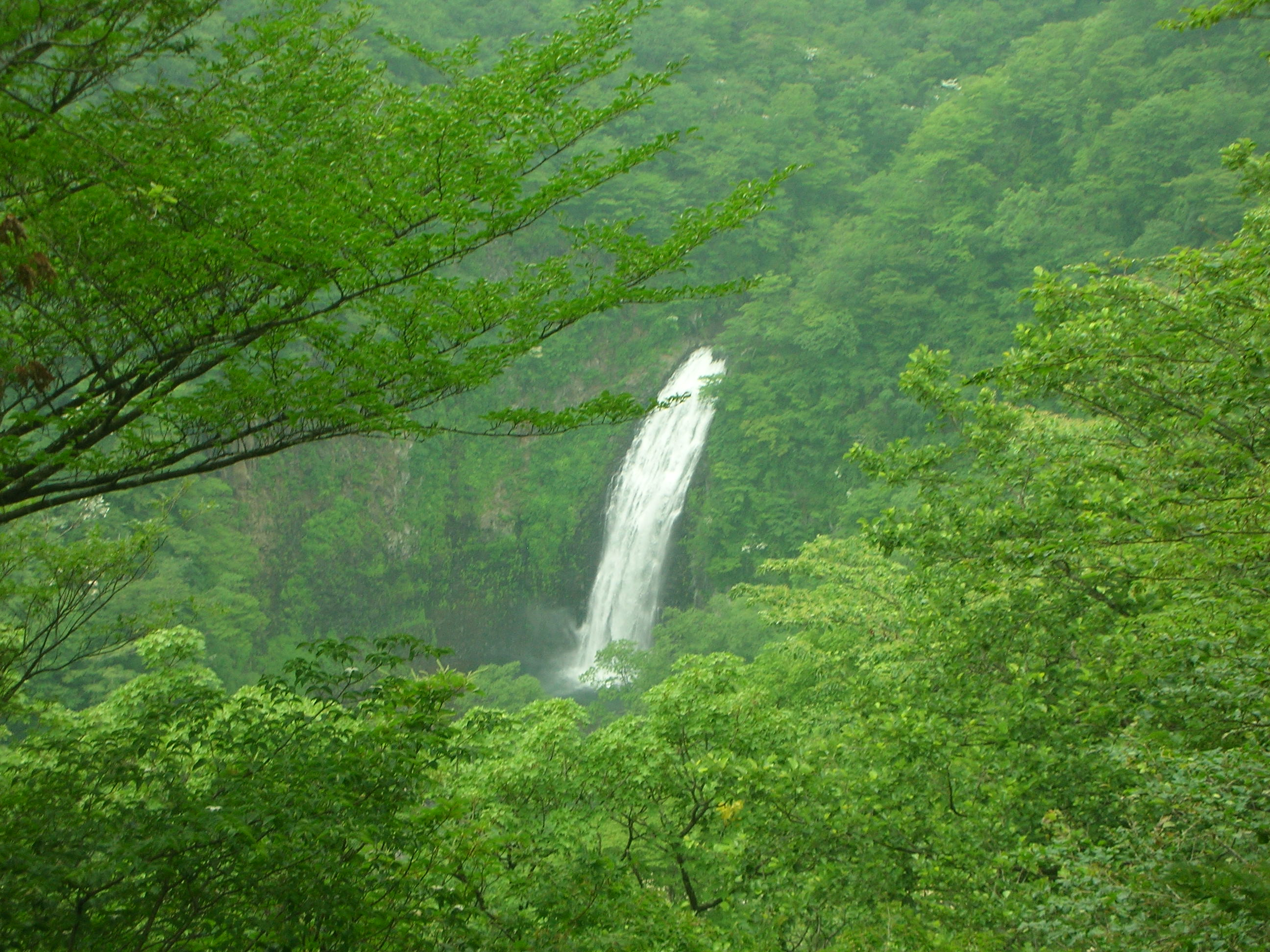 蔵王連峰不動滝